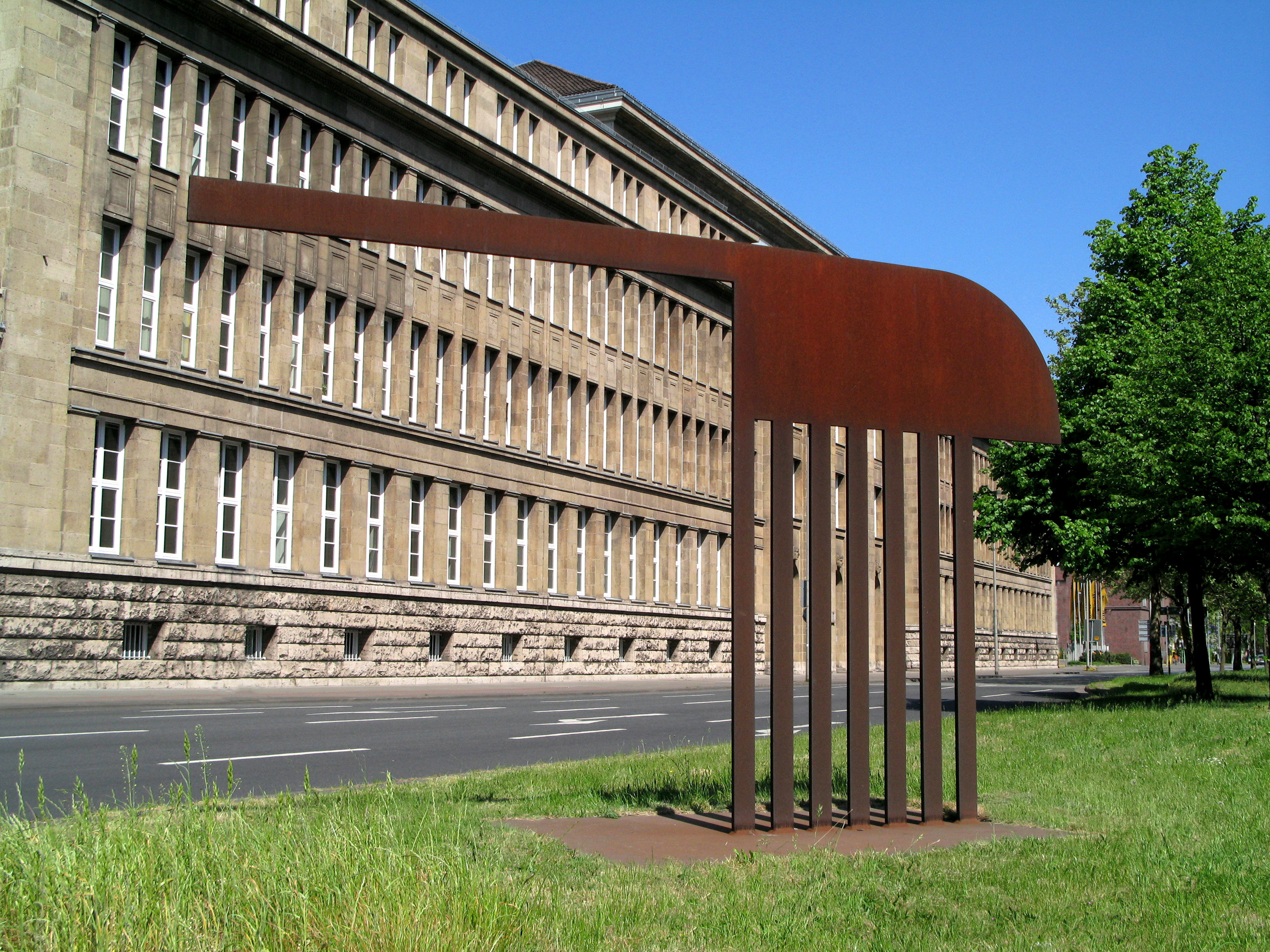 Skulptur „o.T.“ Corten-Stahl, 460x285x3cm, Standort: Hannover/ Vahrenwalder Str.